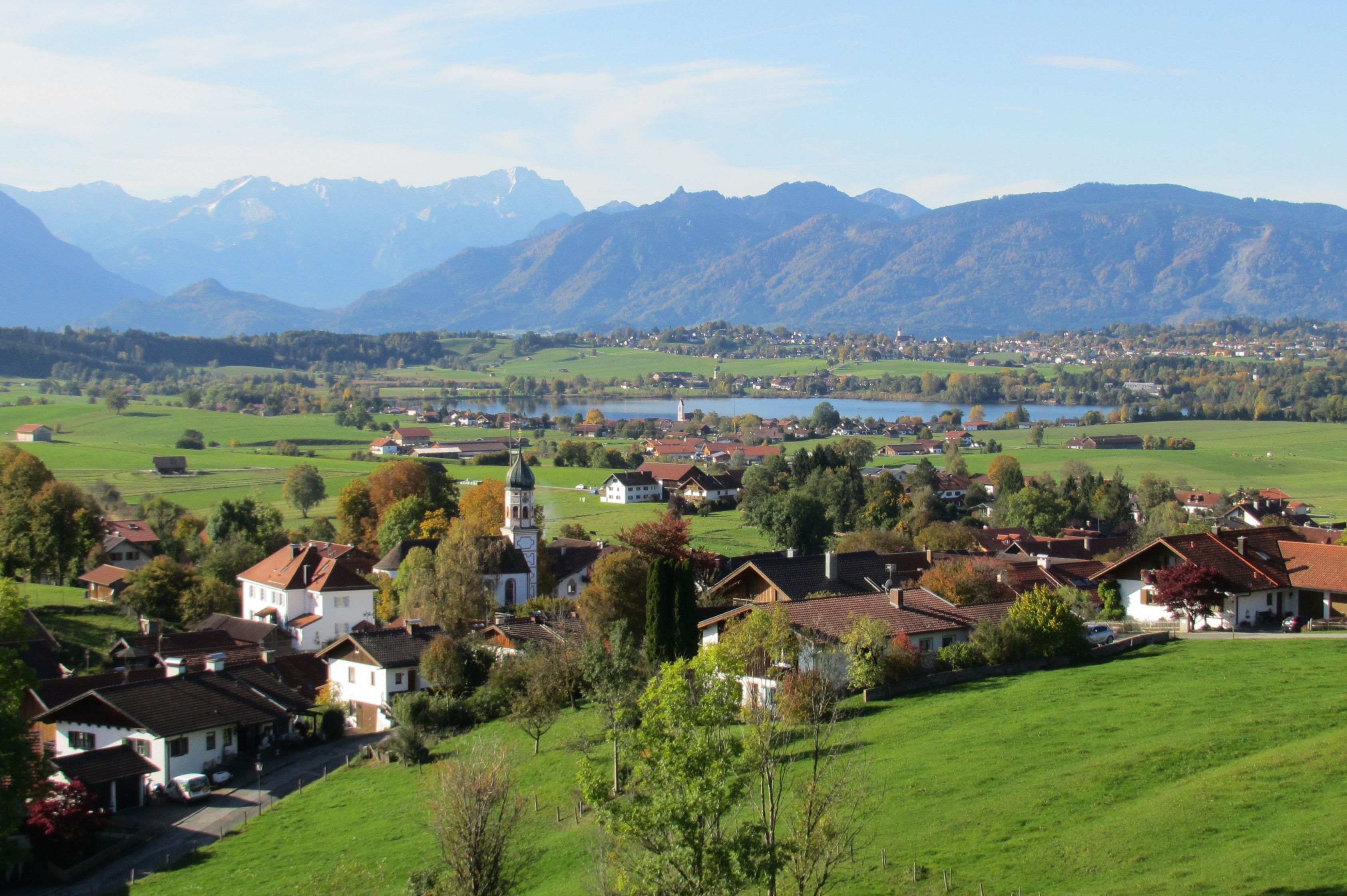 Blick von der Aidlinger Höhe auf Aidling und Riegsee (Ort und See), im Hintergrund Froschhausen, Murnau, Ettaler Manndl und Zugspitze